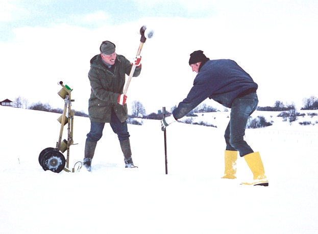 Entnahme von Nmin-Bodenproben vor Vegetationsbeginn